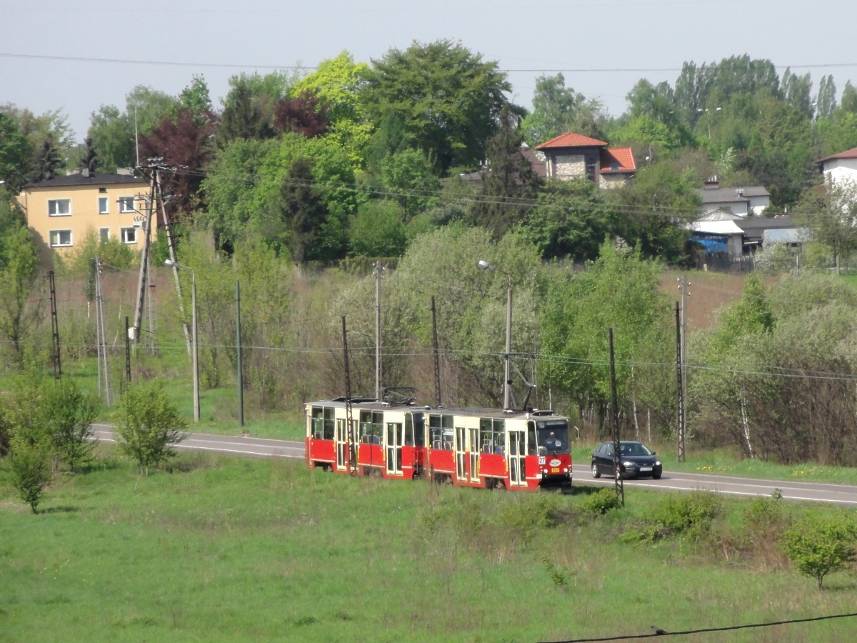 Tramwaj linii 27 zbliżający się do pętli w Kazimierzu Górniczym (Sosnowiec)